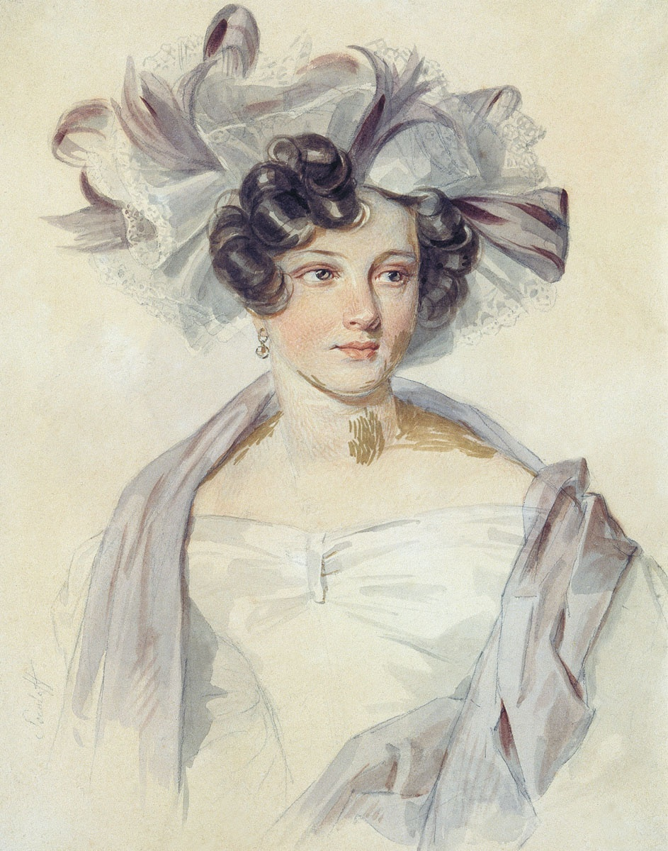 Графиня Анна Евграфовна Комаровская (1806—1872), с 1828 года была замужем за генералом Сергеем Павловичем Шиповым (1790—1876).